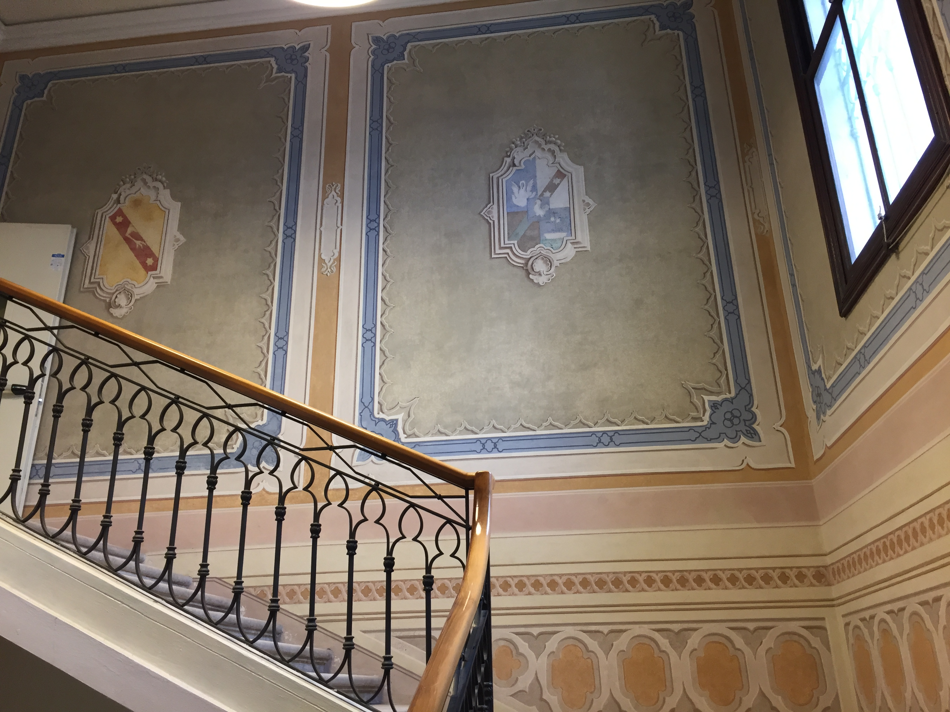 Villa Ferri-Sgaravatti scuola Stefanini Voltabarozzo